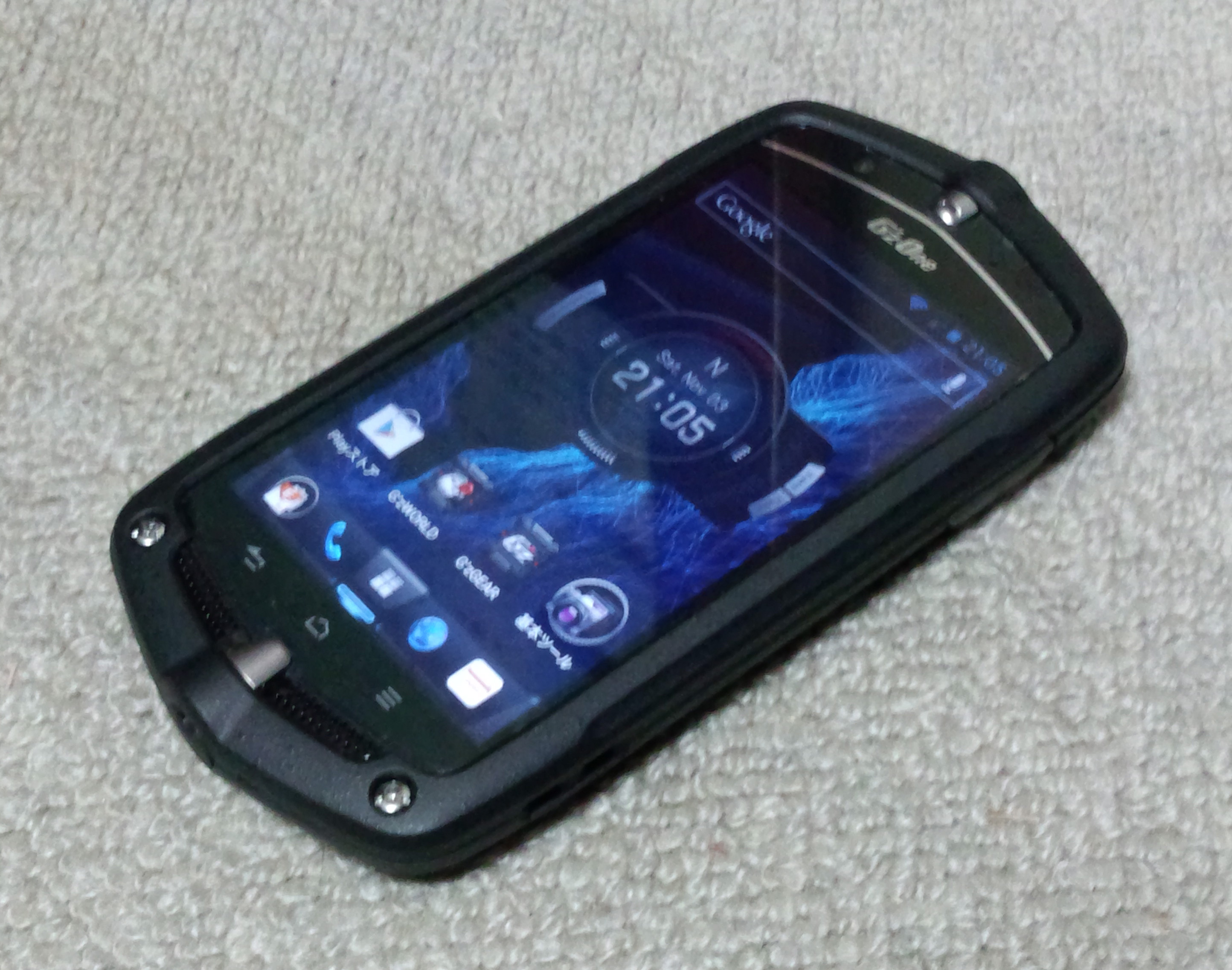 CAL21の表側